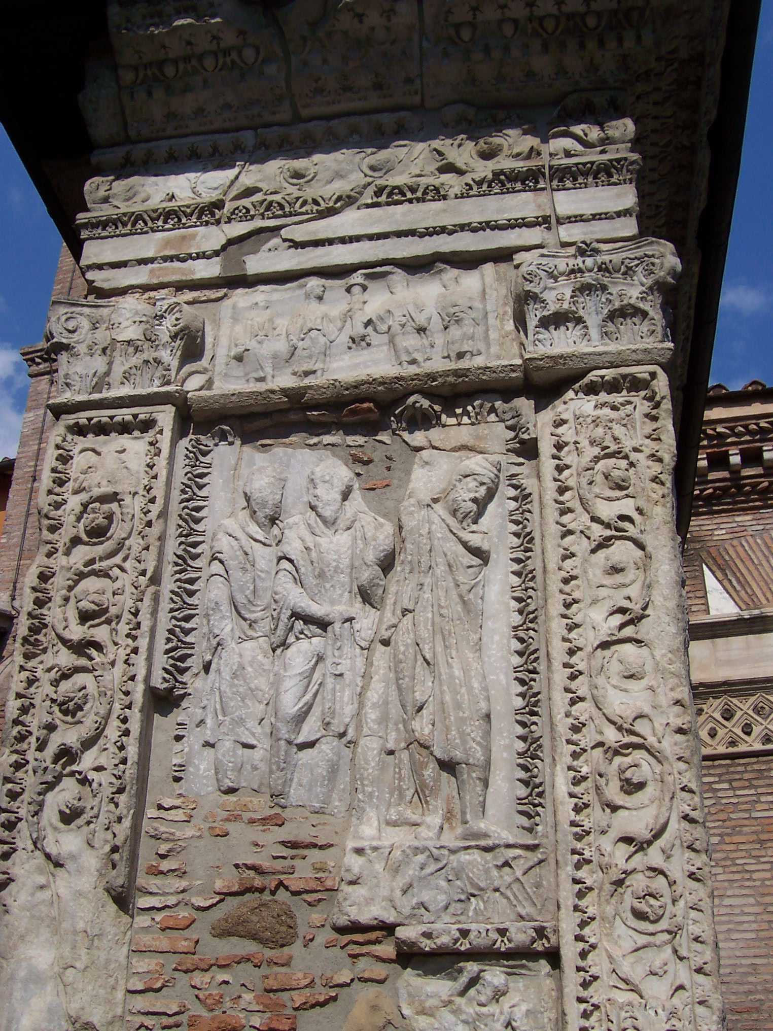 Arco degli Argentari, Rome. External side